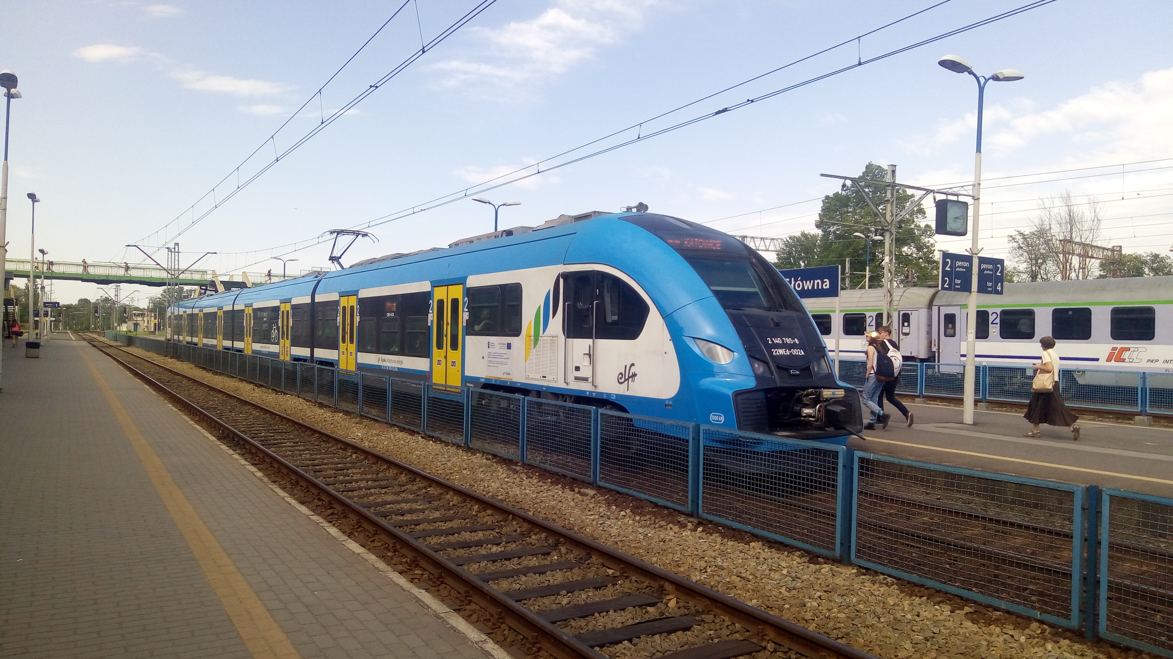 EZT 22WEd (Pesa Elf II) Kolei Śląskich na stacji Bielsko-Biała Główna jako pociąg osobowy S5 Bielsko-Biała Główna - Katowice